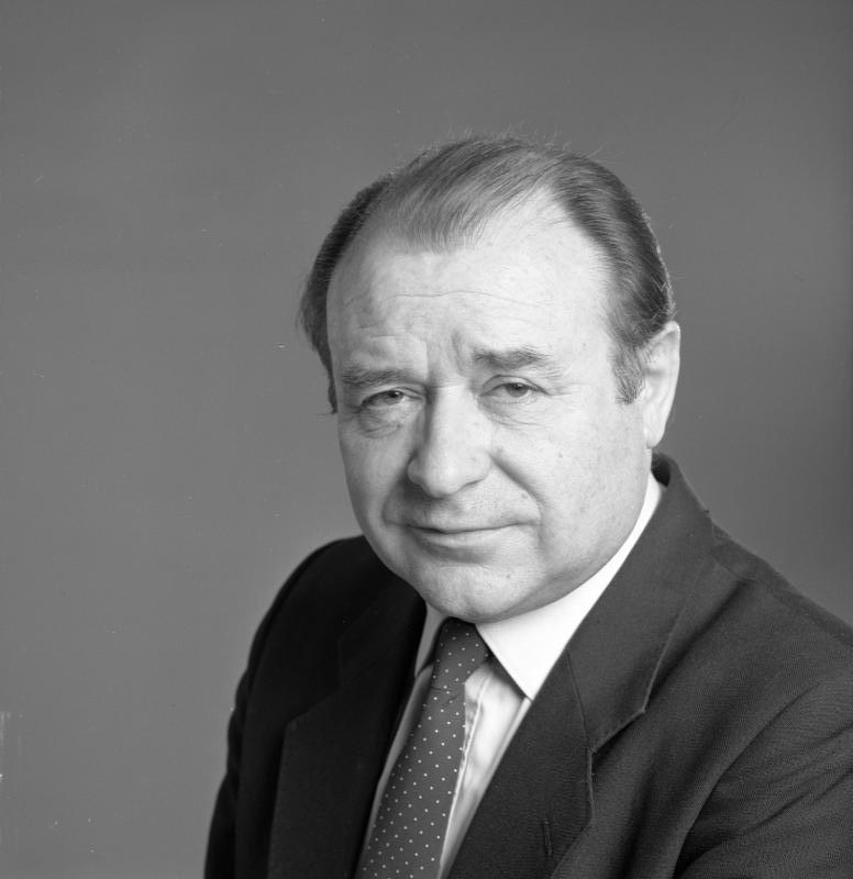 Heinrich Lummer Mitglied des Deutschen Bundestags